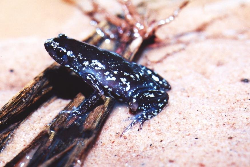 Chiasmocleis albopunctata